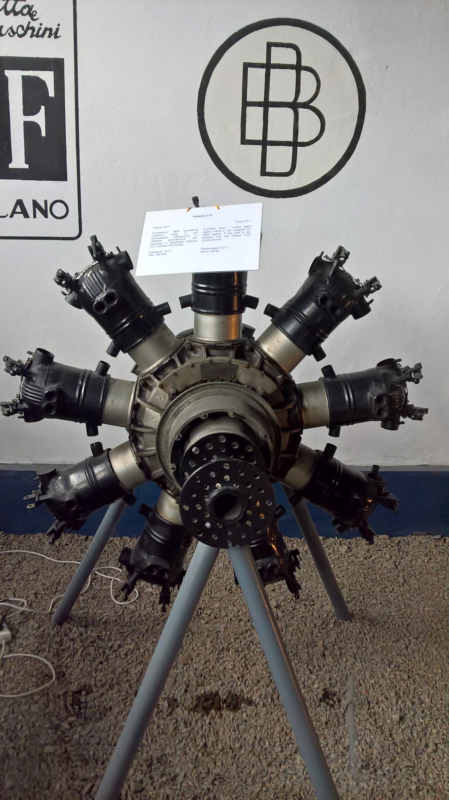 Francuski 9-cylindrowy silnik gwiazdowy Salmson 9Z z 1917 r. ze zbiorów Muzeum Lotnictwa Polskiego w Krakowie.